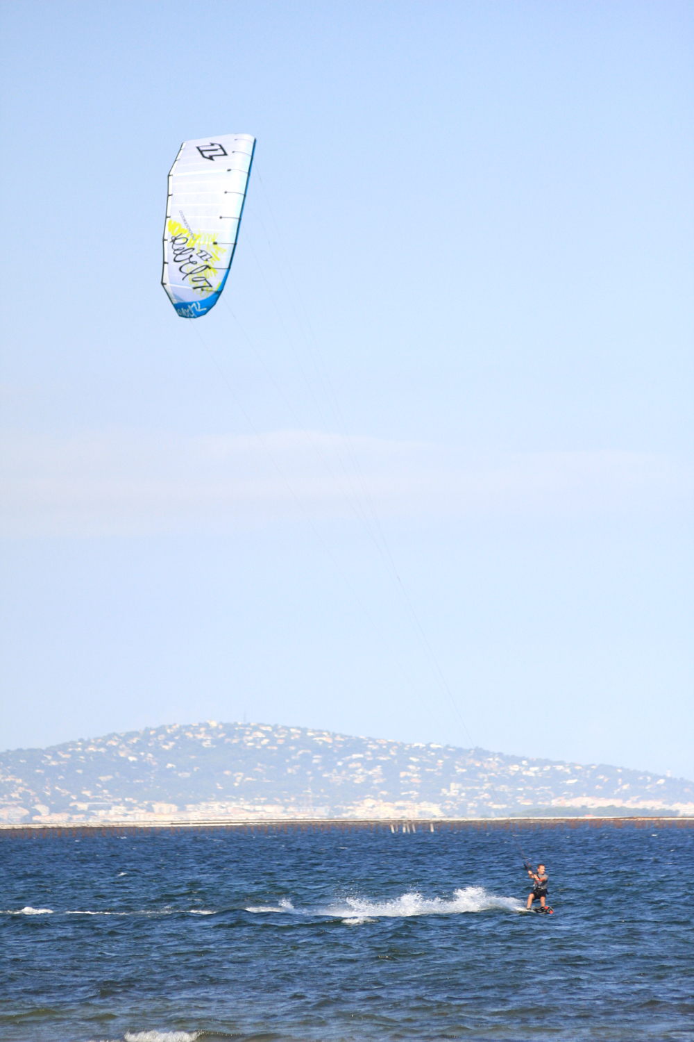 Kite surfer sur l'étang de Thau, vu depuis Marseillan. À l'arrière-plan, Sète.